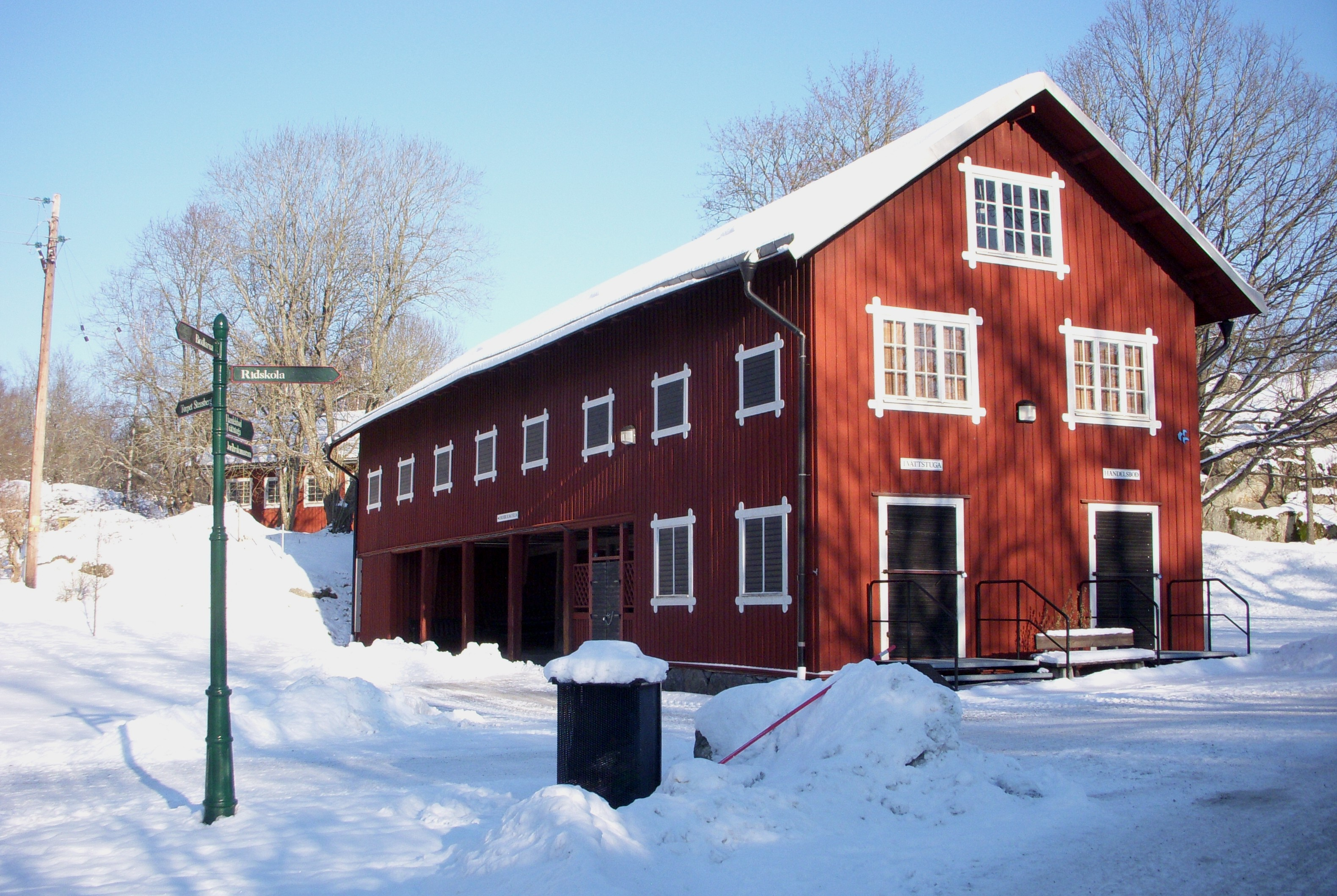 Sundby Gård vid Orlången, Huddinge kommun, lider